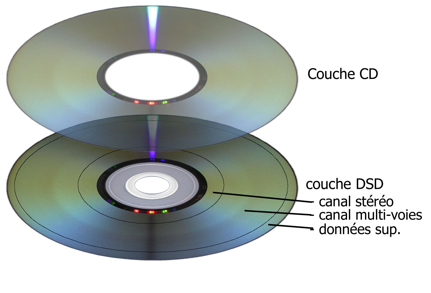 Schéma explicatif des couches du CD SACD. Schéma réalisé personnellement.